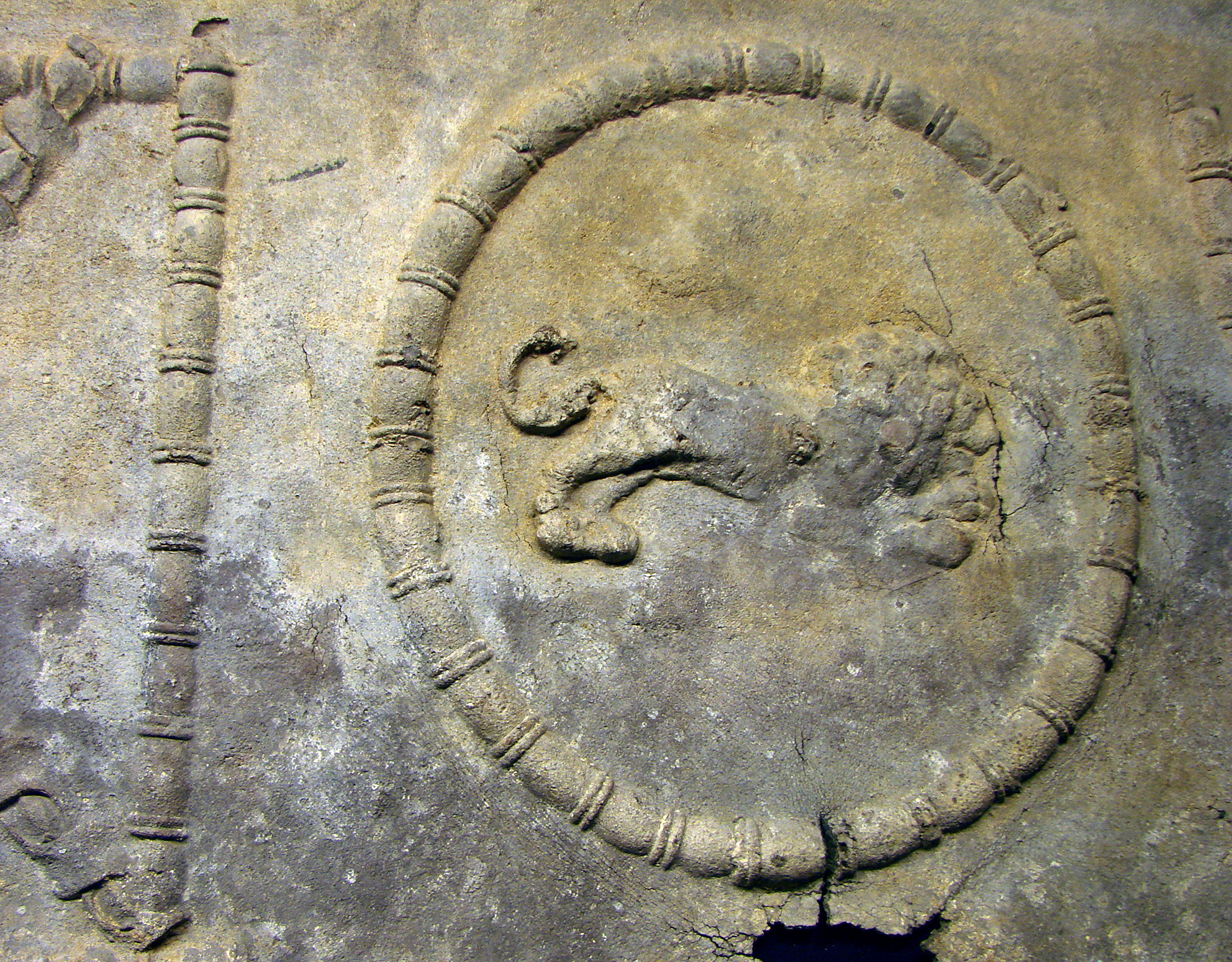 Lion en bas-relief, détail du décor d'un sarcophage en plomb, 4ème siècle, nécropole sud de Metz, musées de la Cour d'Or à Metz, Moselle, France.